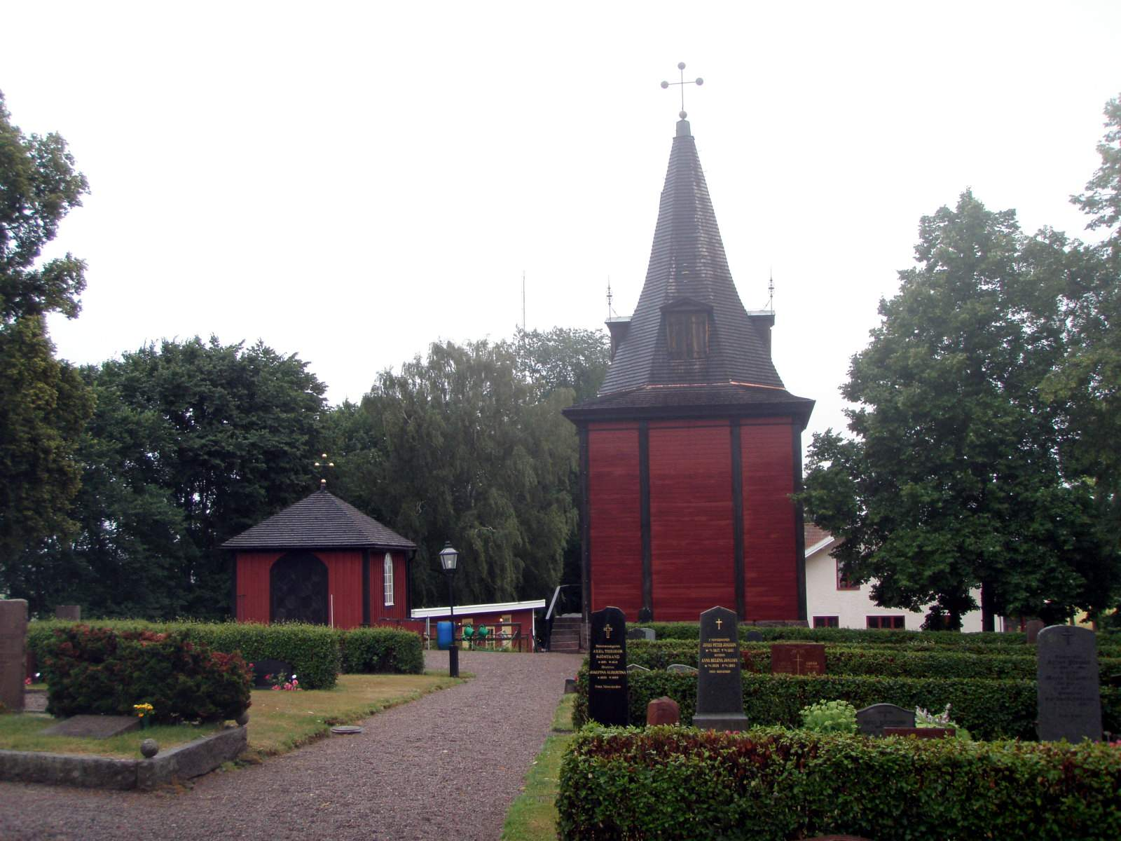 Örtomta kyrka.